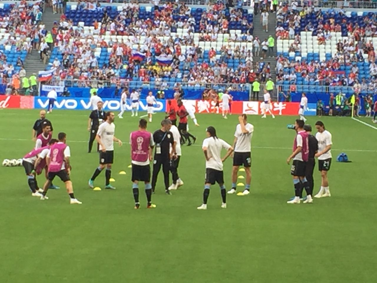 El seleccionado uruguayo practica antes del partido.